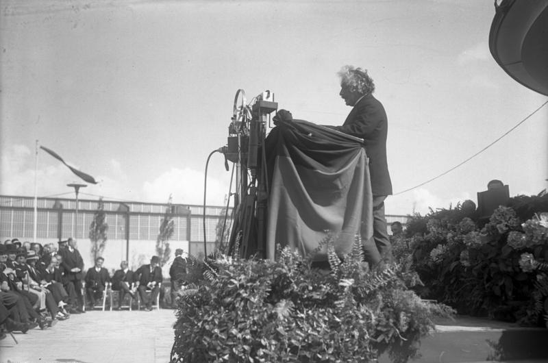 Die feierliche Eröffnung der 7. großen Funkausstellung am Kaiserdamm in Berlin! Zum ersten Male sprach Prof. Dr. Albert Einstein während der Eröffnung. Prof. Dr. Albert Einstein am Rednerpult während seiner bedeutsamen Eröffnungsrede auf der Funkausstellung.